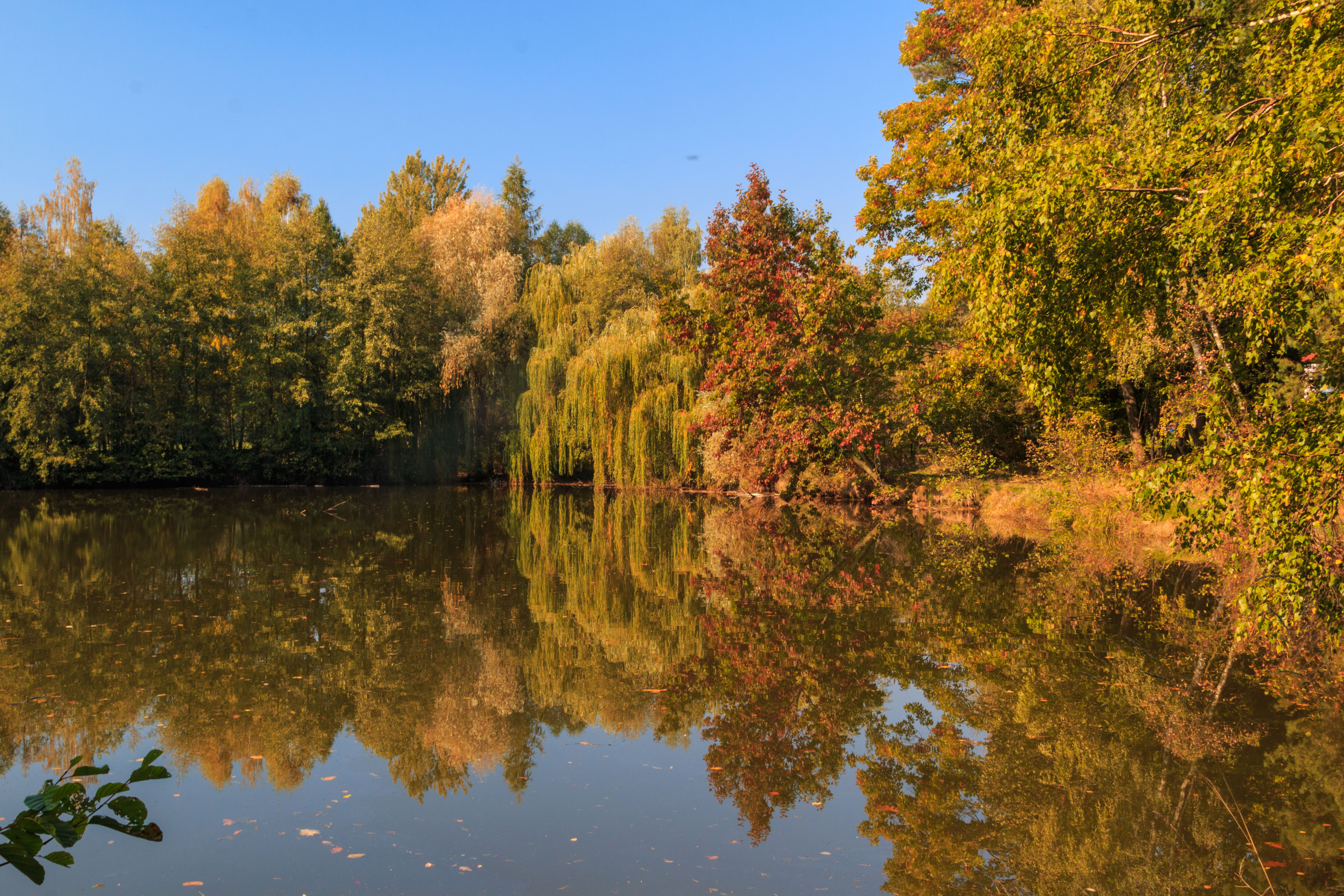 Rybník u Kochánovic Project: Vodstvo. Ticket: 1618.